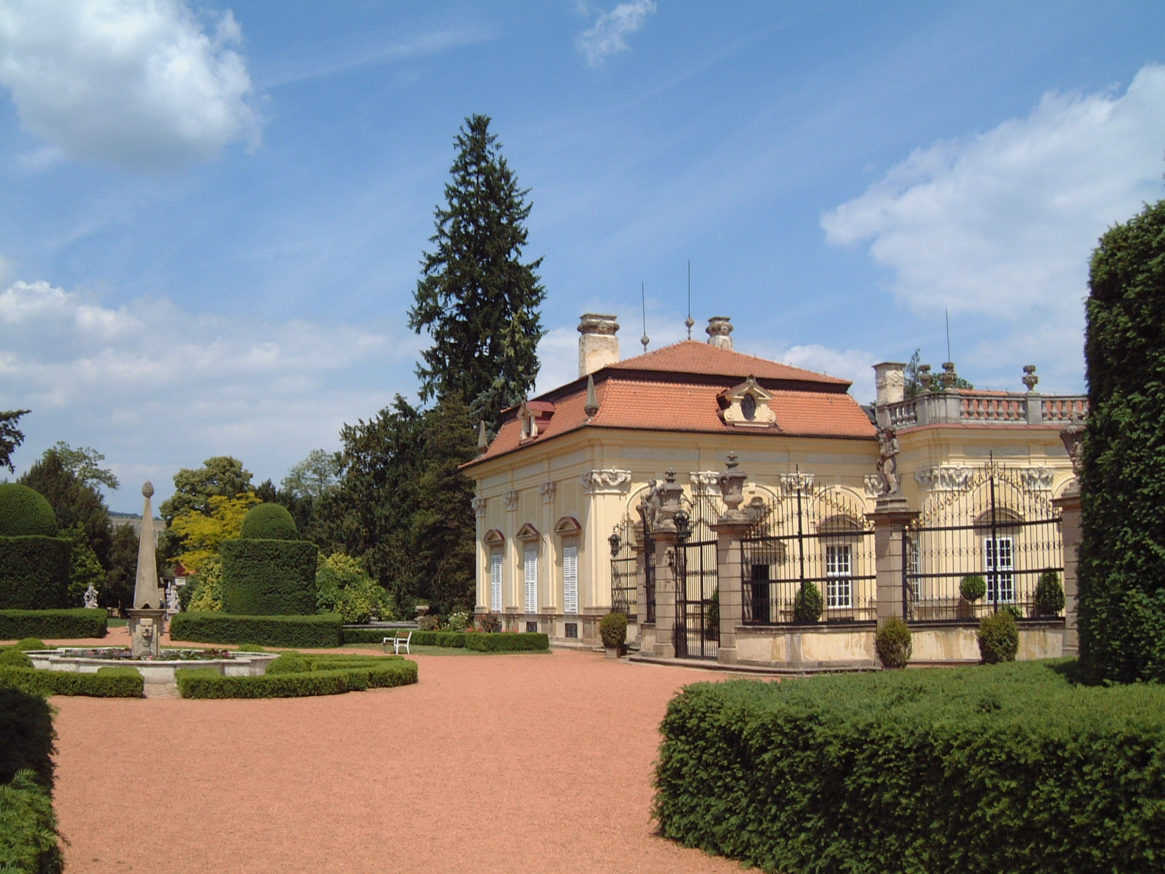 Česky: Zámek Buchlovice